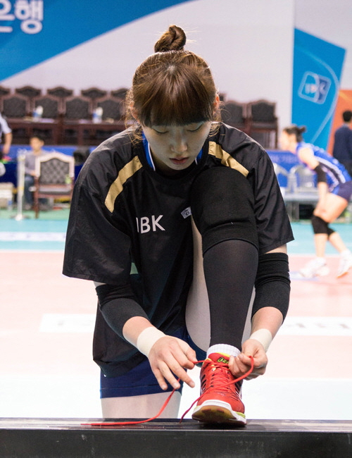 (기업은행) 챔피언결정전 5차전 13-14 시즌 마지막 경기 박수쳐주고 싶은 선수들..